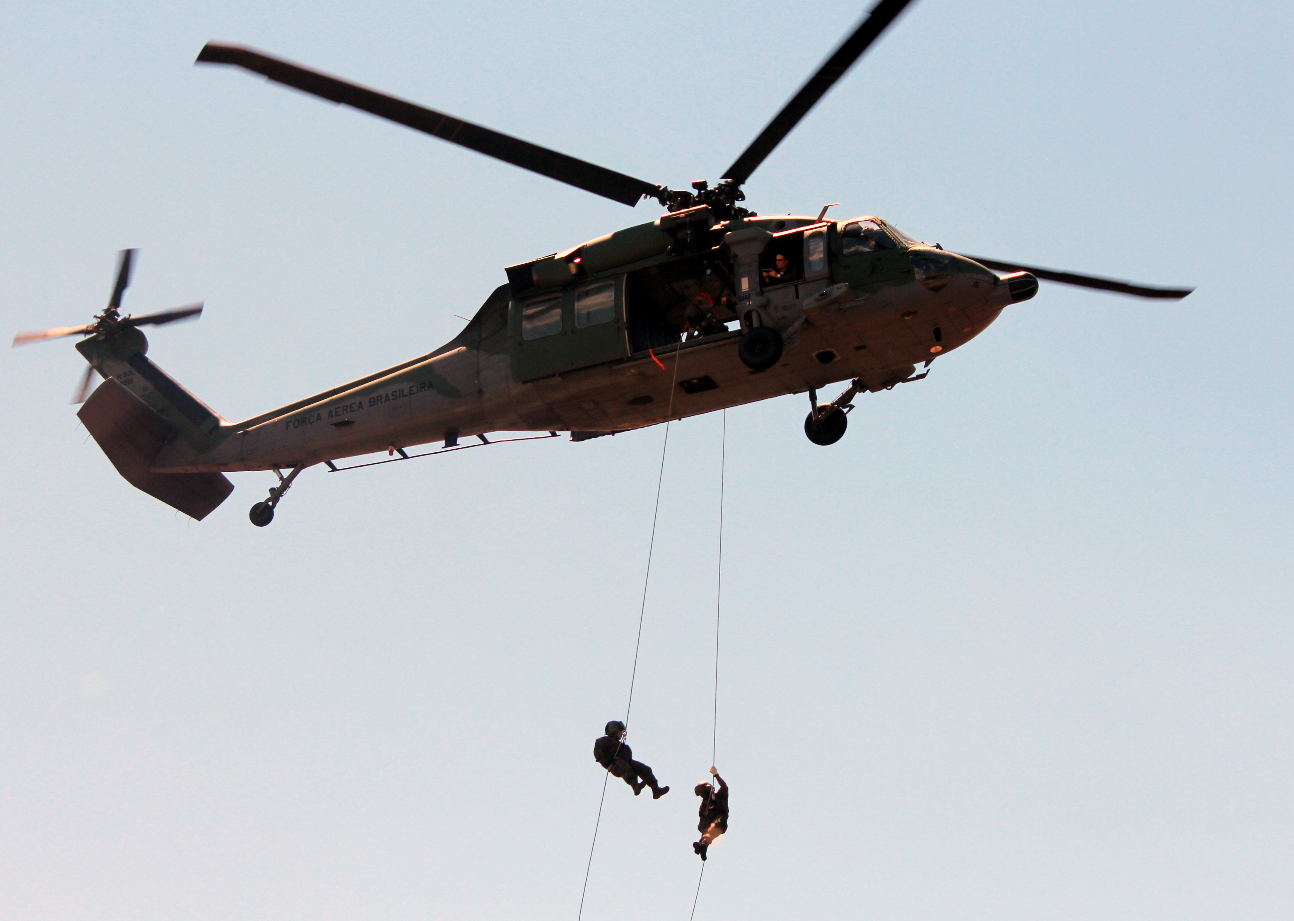 Sikorsky UH-60L Força Aérea Brasileira